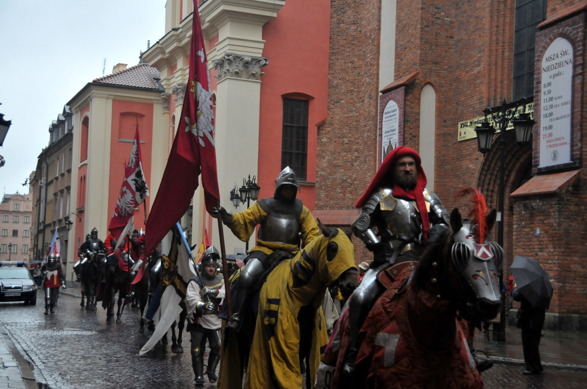 cavalcade